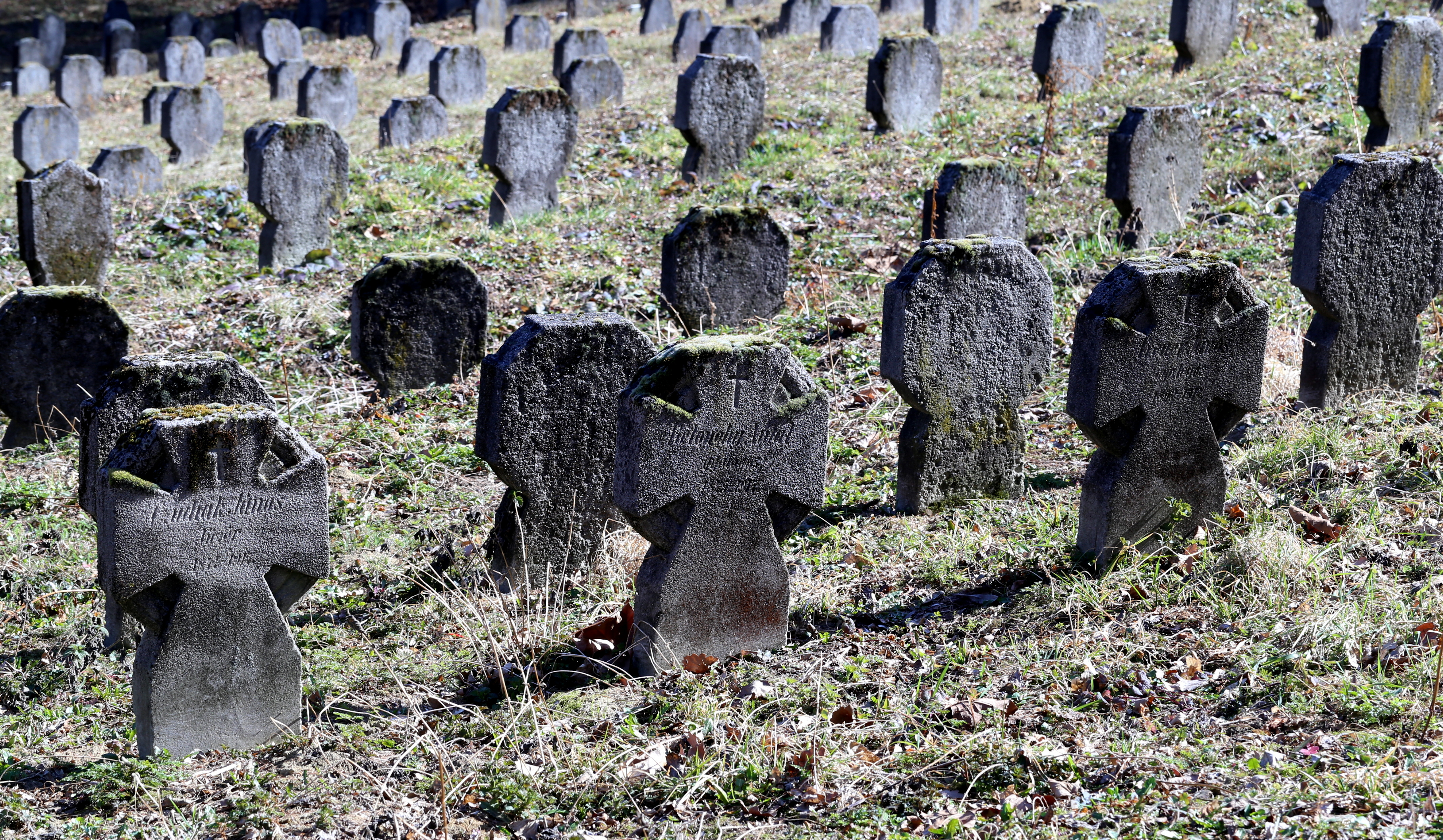 Bánfalva, 1. világháborús temető